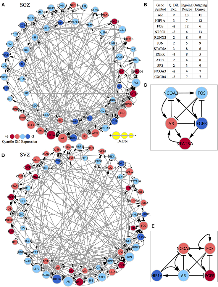 Η εικόνα αυτή περιγράφει την αλληλεπίδραση μεταξύ γονιδίων για τη ρύθμιση της γονιδιακής έκφρασης κατά τη διαφοροποίηση των κυττάρων του εγκεφάλου